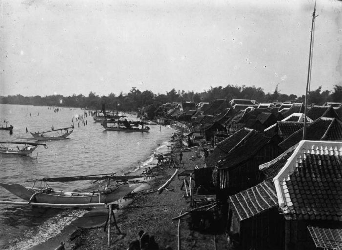 Foto. Oost-Java, Lekok, vissersdorp aan zee